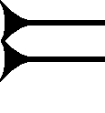 Cuneiform sign